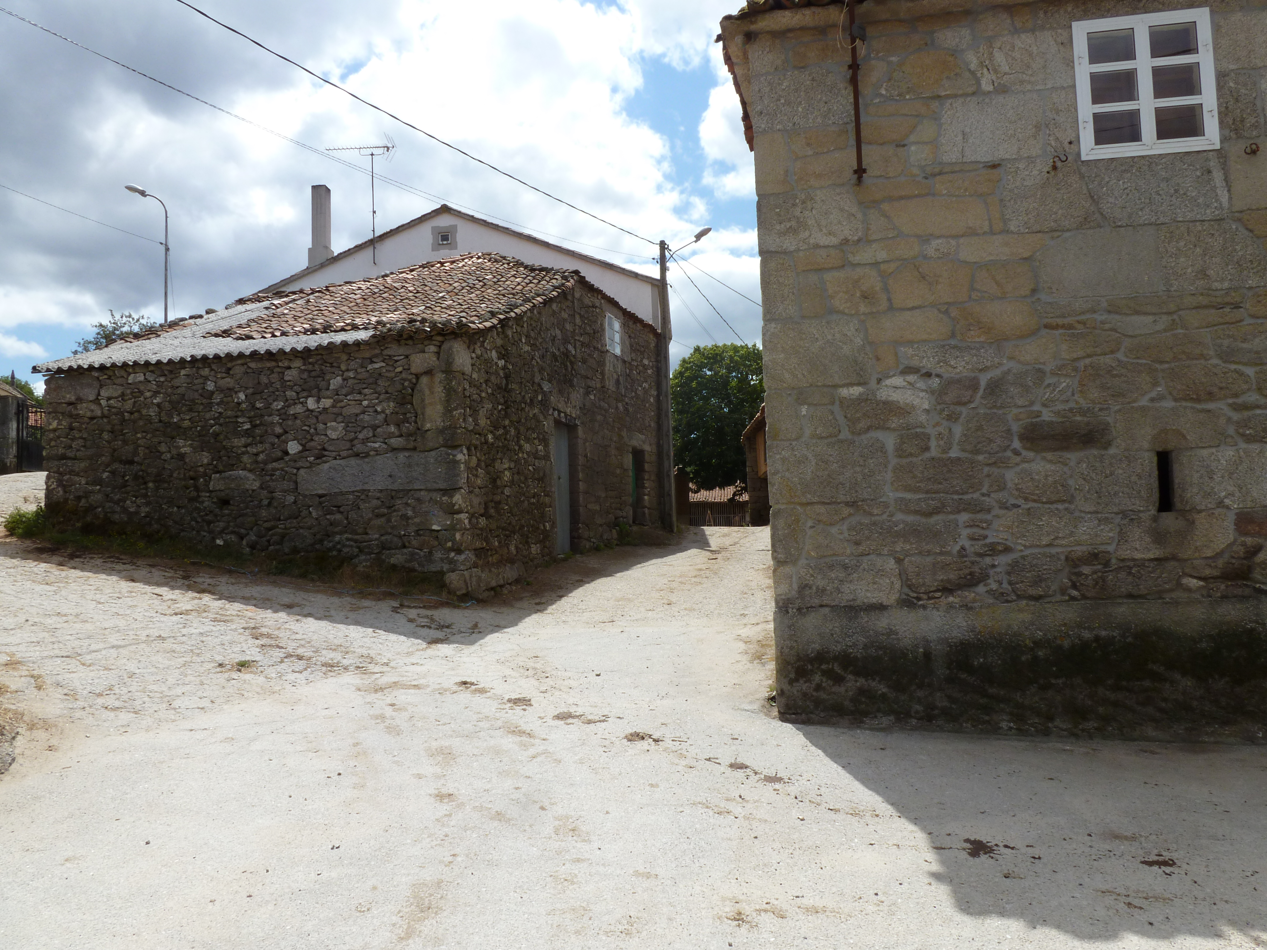 Lugar da Laxa, parroquia de Cartelos, concello de Carballedo, Lugo